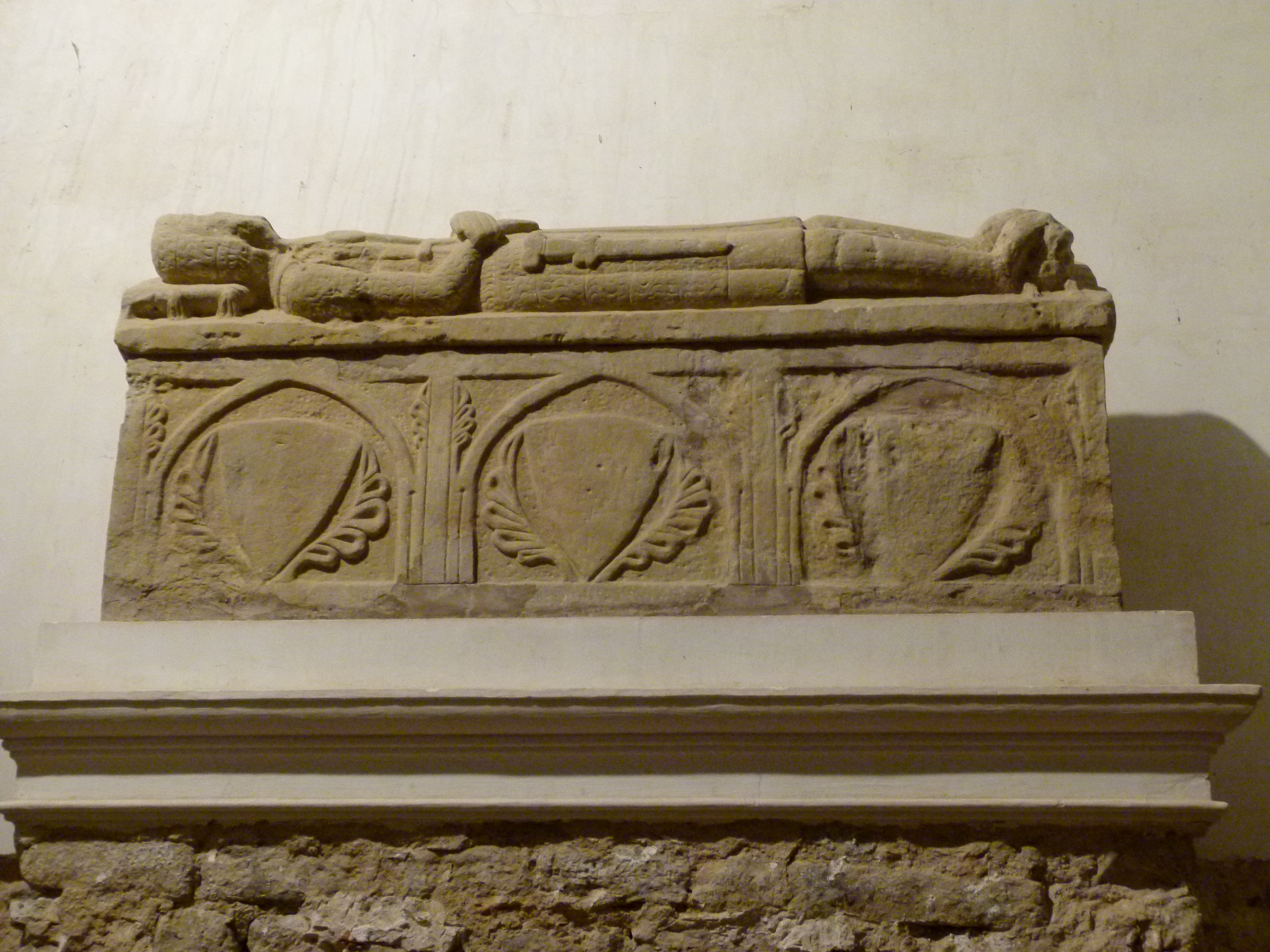 Sarcòfag del comte Oliba Cabreta a Sta. Maria de Serrateix (Bergadà)